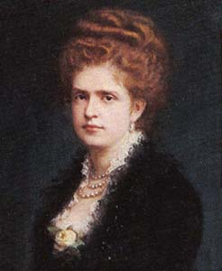 Maria Pia de Sabóia, Rainha de Portugal